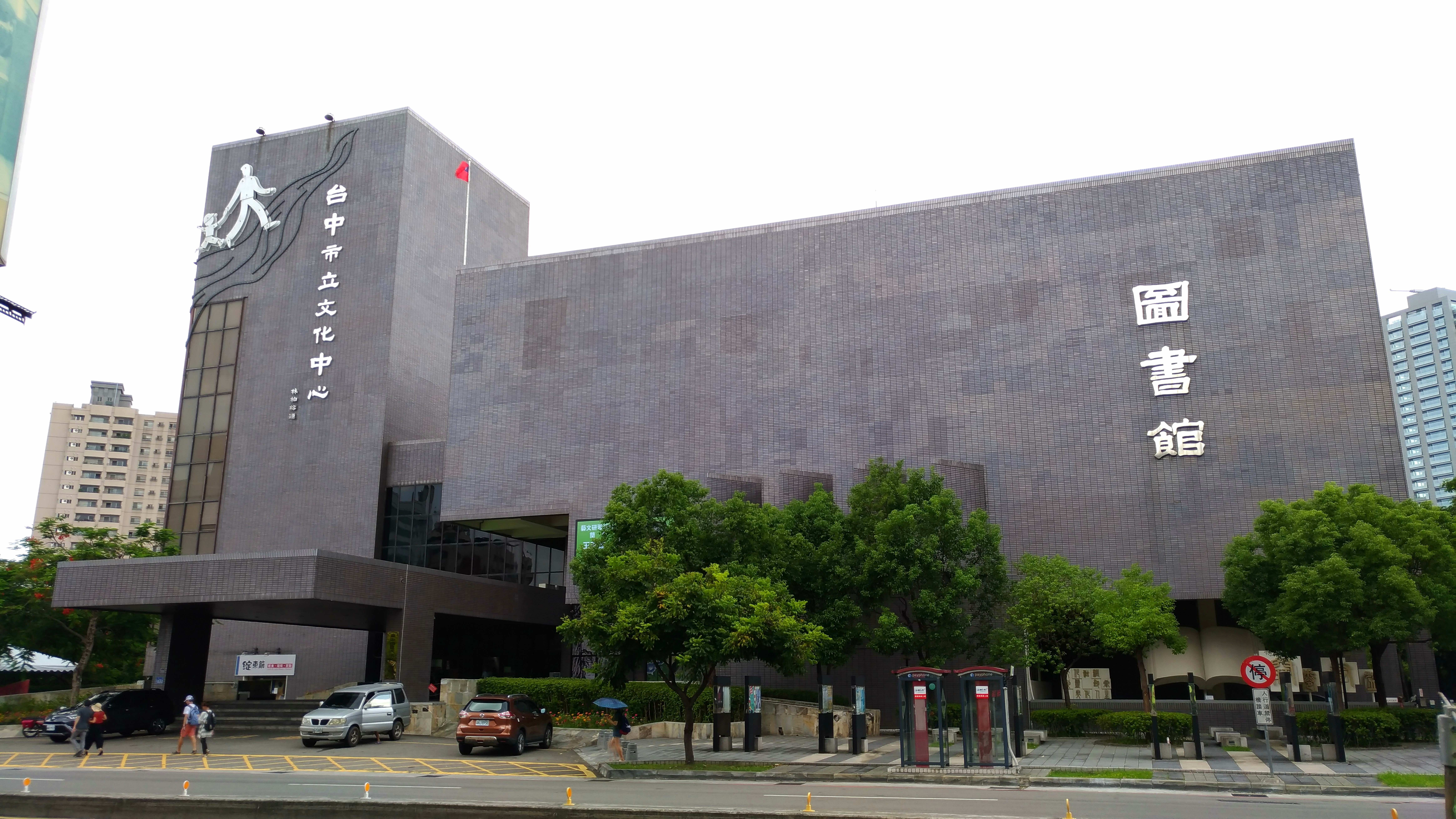 臺中市大墩文化中心與市圖大墩分館